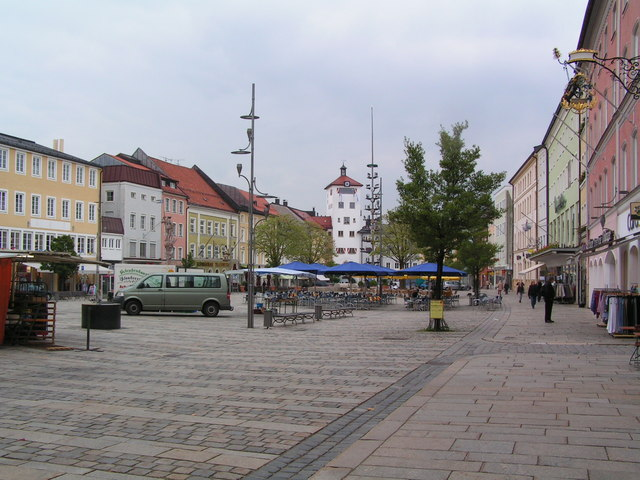 Stadtplatz Traunstein, near to Traunstein, Deutschland (Zone 33).